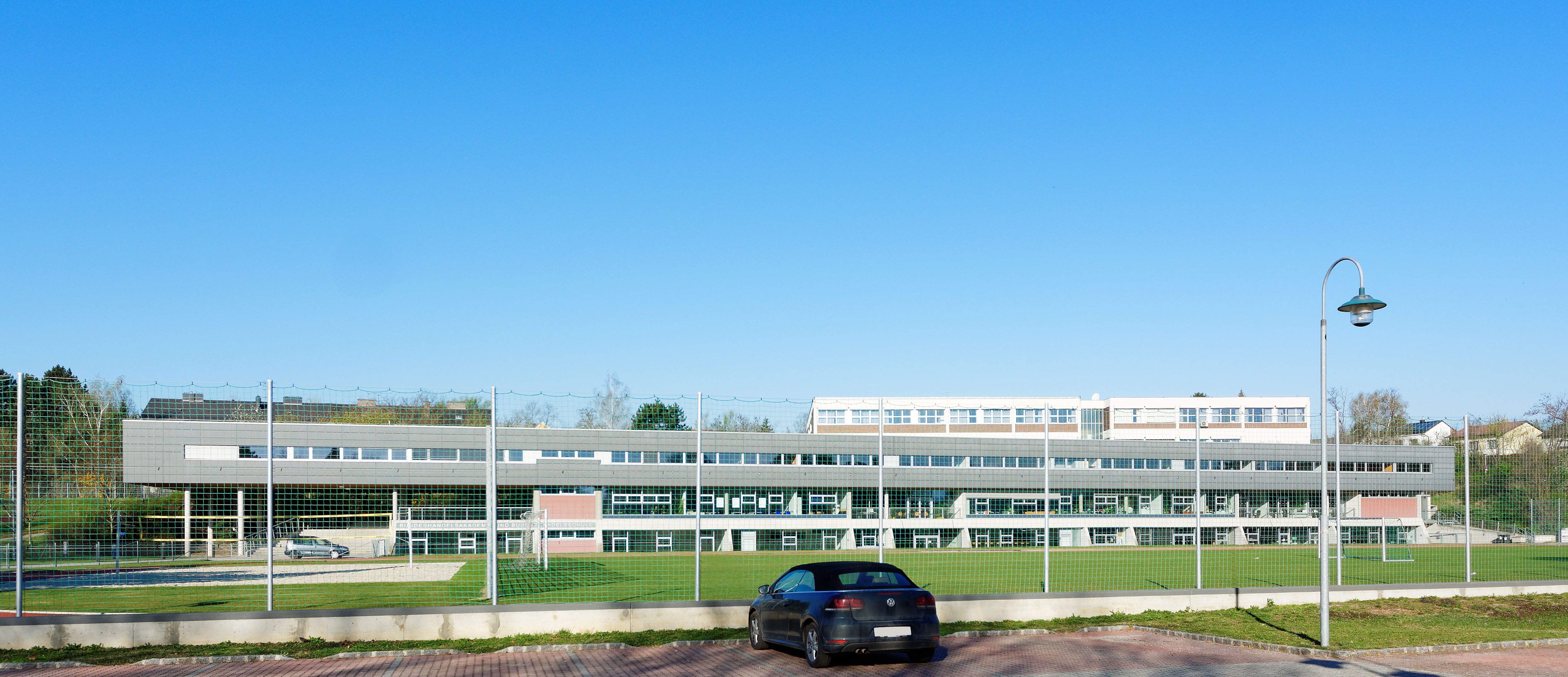 Bundesoberstufenrealgymnasium in Mistelbach, Rückseite, Niederösterreich, Österreich